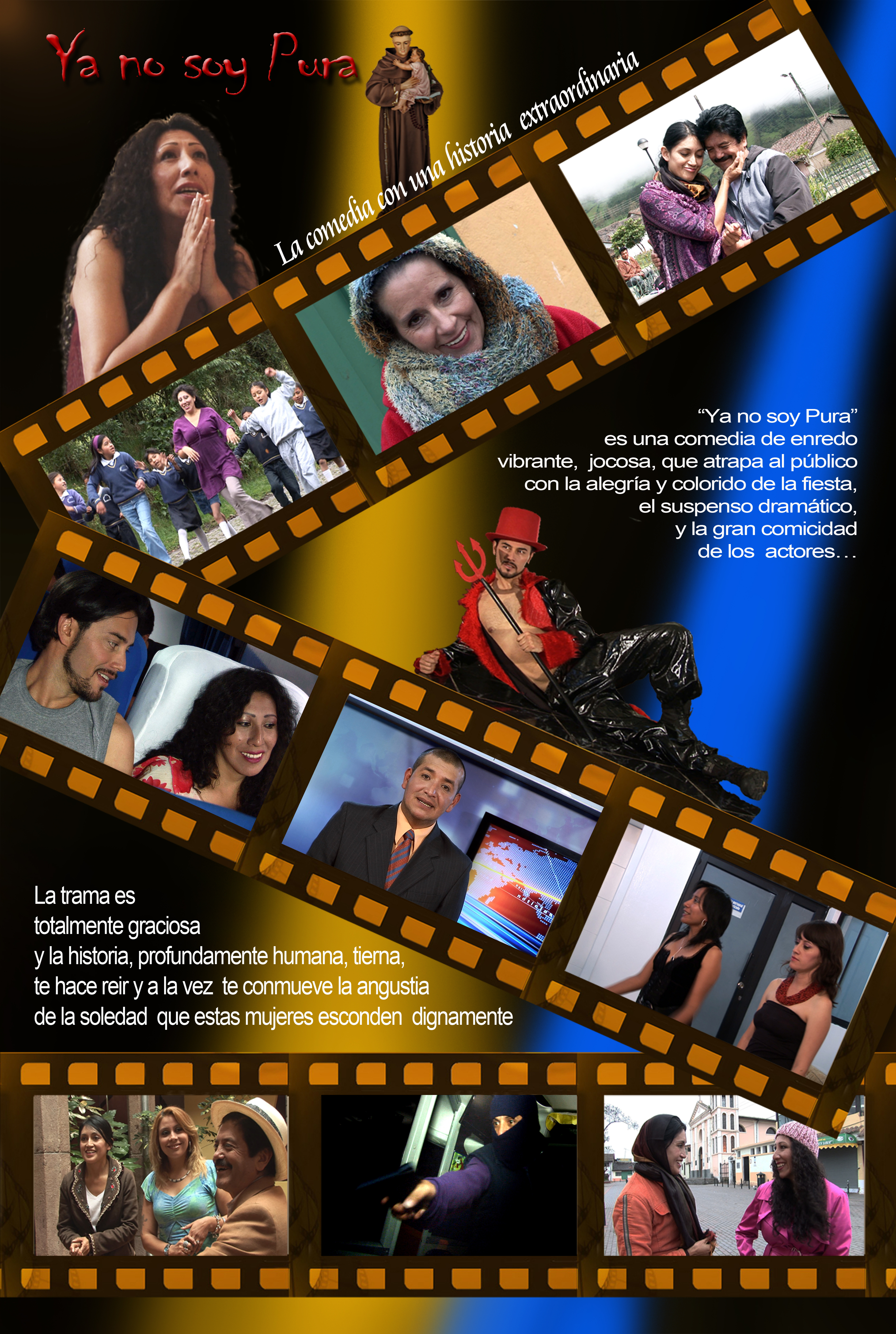 Momentos de la película ecuatoriana Ya no soy Pura